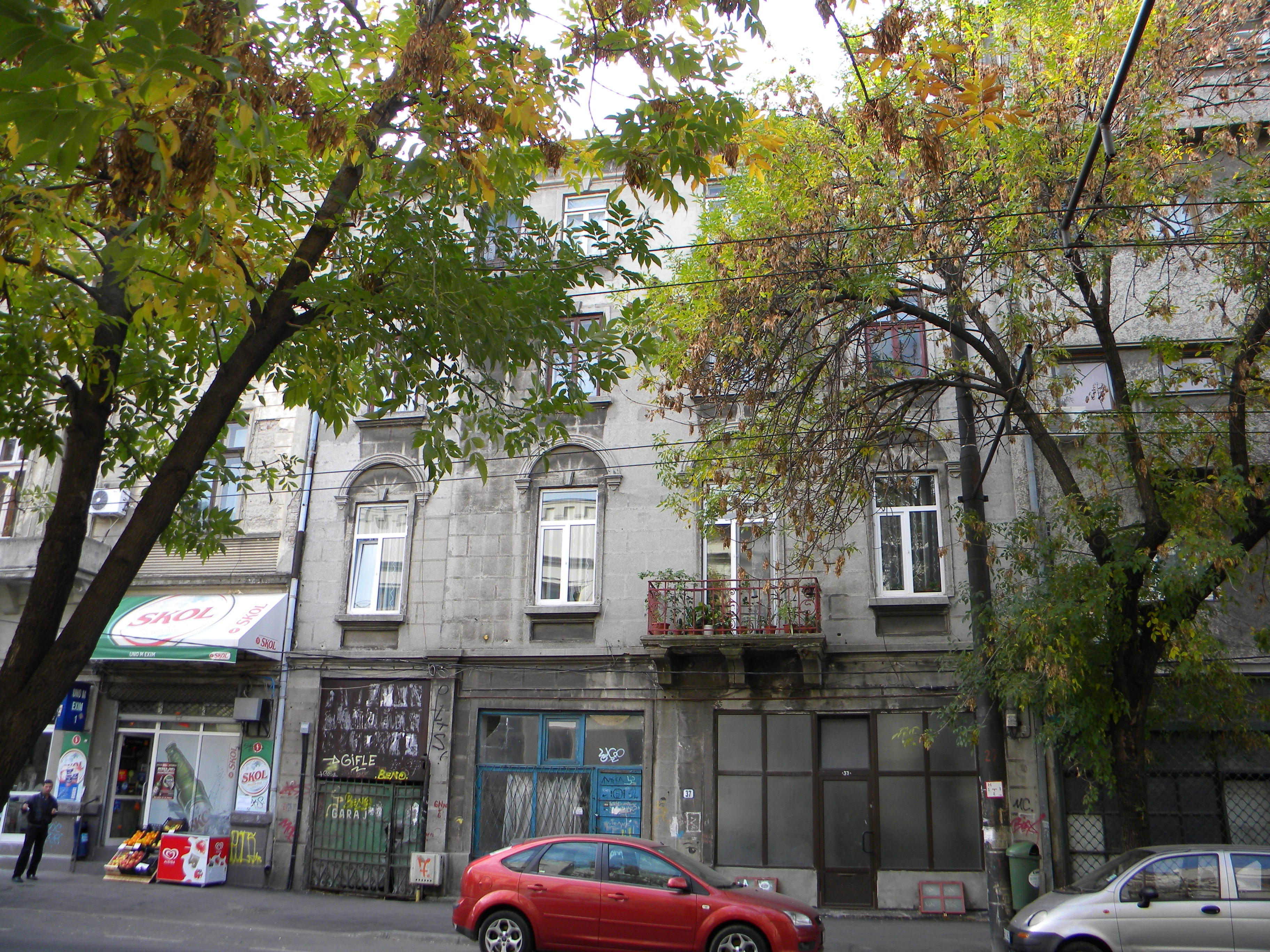 Bucuresti, Romania, Casa pe Calea Grivitei nr. 37, sect. 1